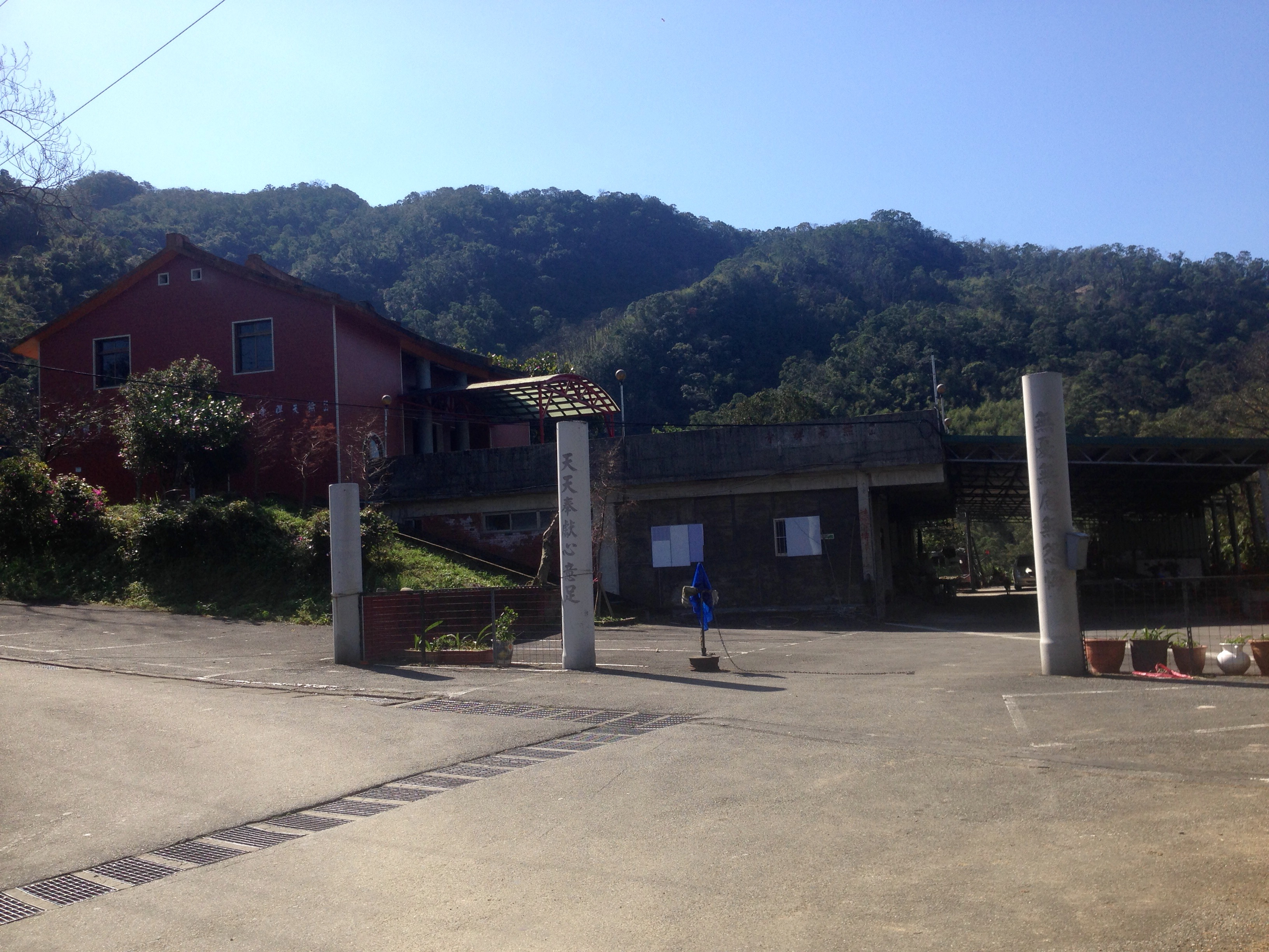 中文（台灣）: 無天禪寺入口